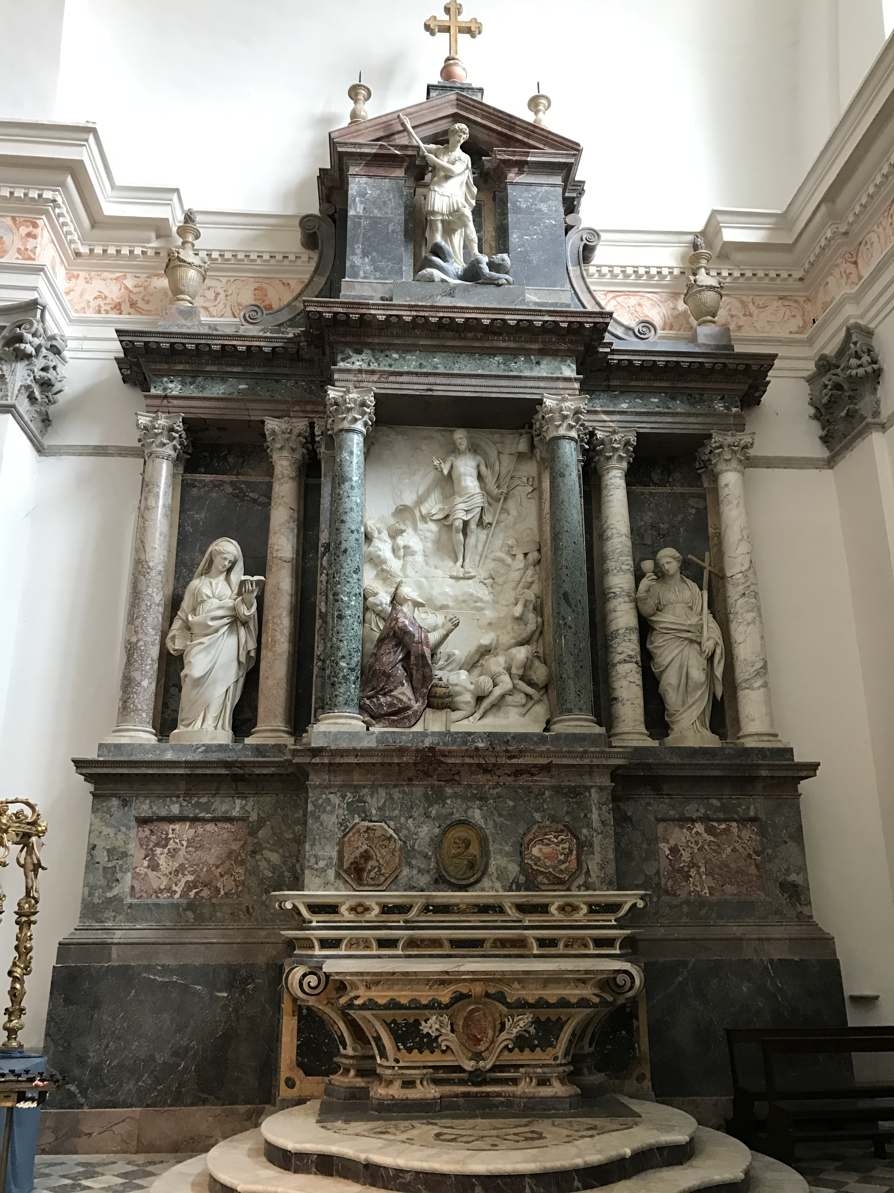 Cenotafio di papa Pio V nella Chiesa di Santa Croce e Ognissanti in Bosco Marengo